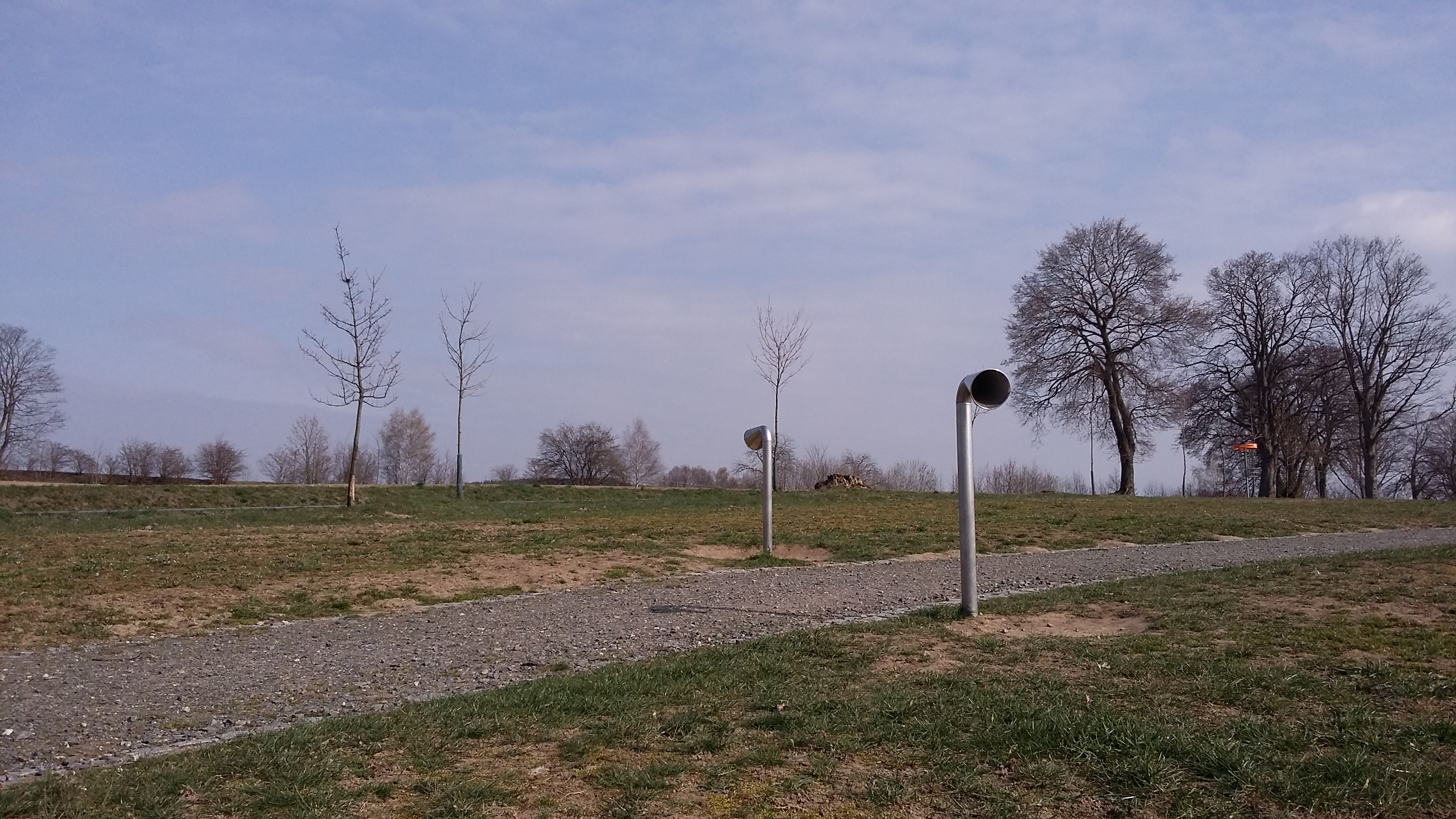 Šeptanda, rekreační areál Pilák, Pilská vodní nádrž, Žďár nad Sázavou.